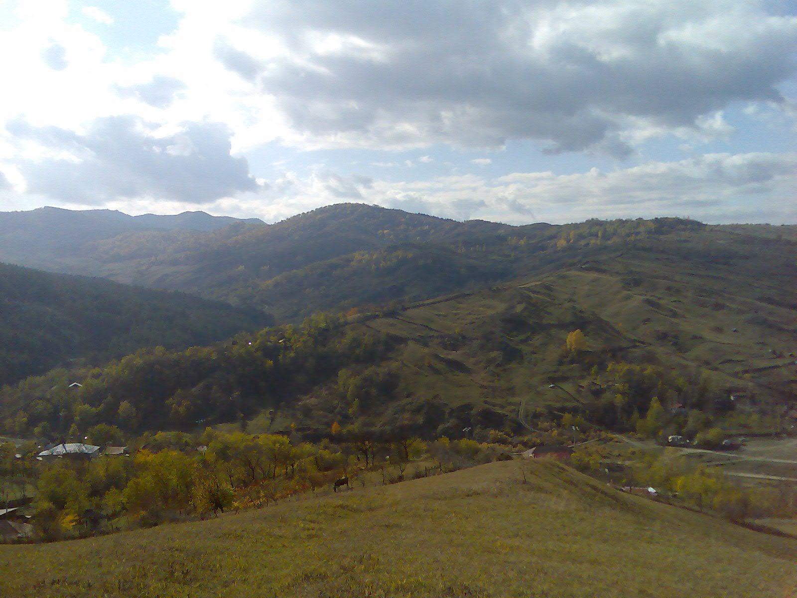 Vedere din Canesti spre satul Gontesti.In spate grupul de dealuri Dalma.